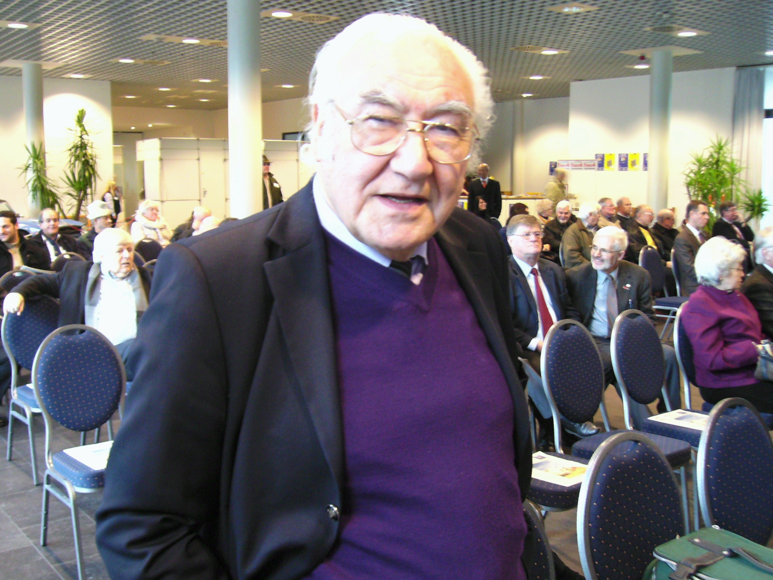 Journalist Ernst Schneider